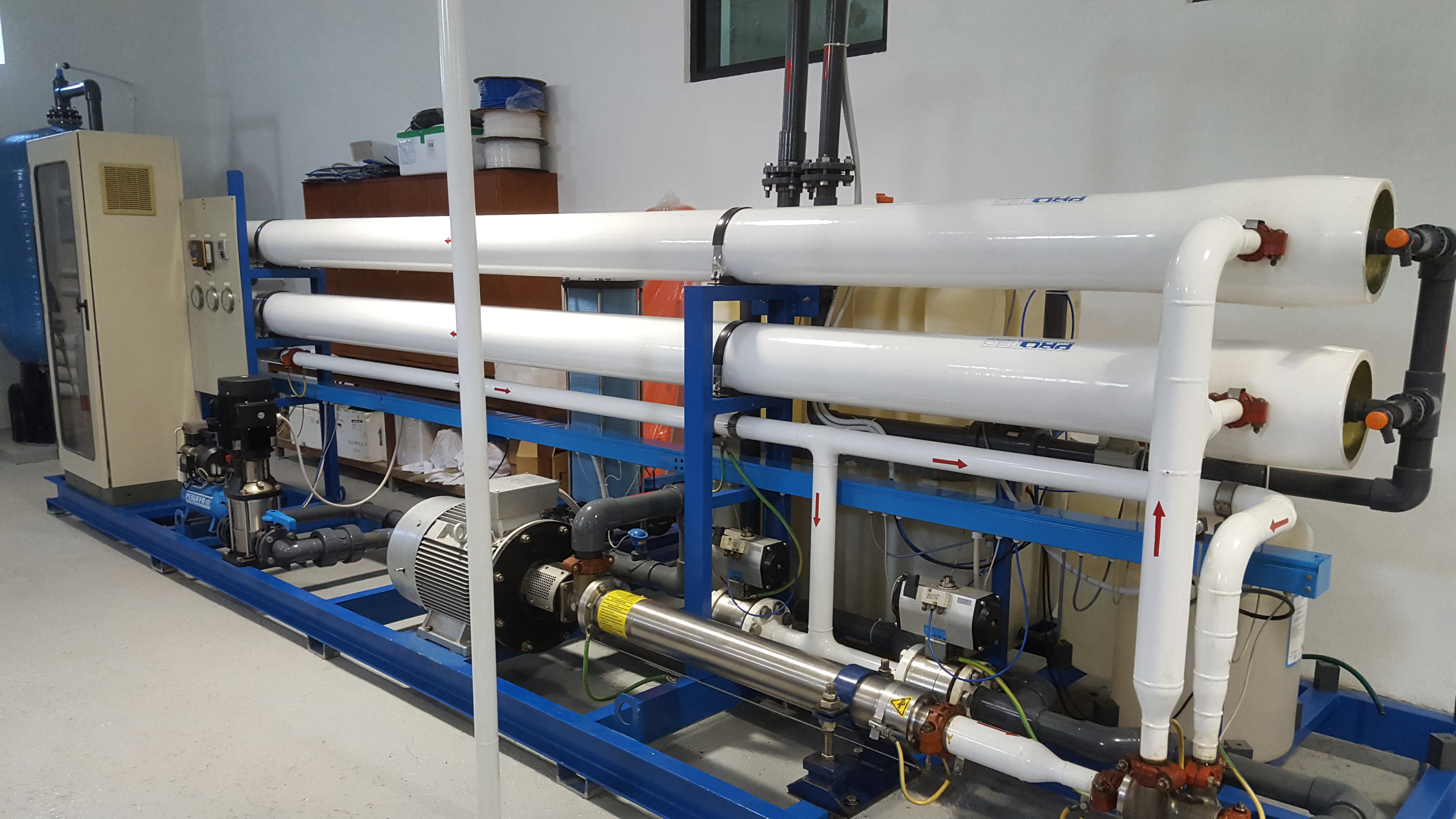 Umkehrosmoseanlage für die Süsswasserversorgung der Insel Vilamendhoo